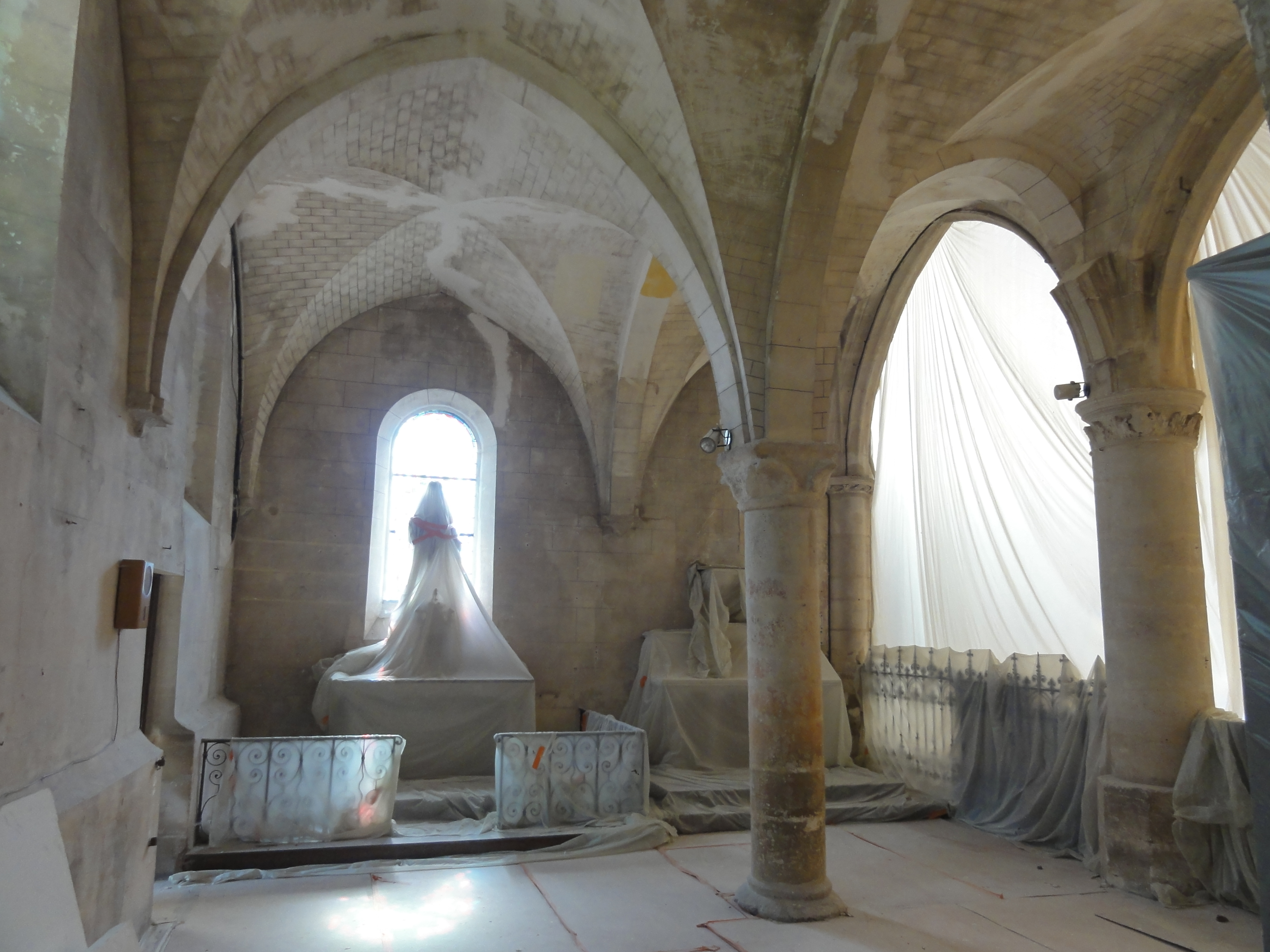 Chapelle nord, vue vers l'est.